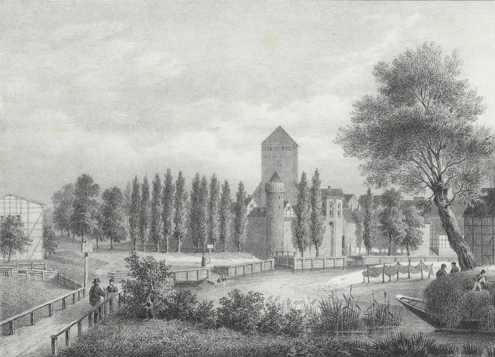 Gollnow, Historische Ortsansicht. Lithographie, um 1845. 14,0 x 19,6 cm (Darstellung) / 20,6 x 26,1 cm (Blatt), Unterhalb der Darstellung mittig betitelt, sowie mit dem Vermerk "Lith. Anst. v. E. Sanne u. Co. in Stettin" unten rechts versehen.